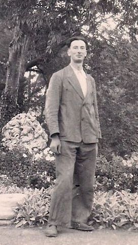 1940-08 Miron ZLATIN sur la terrasse du château de Jacou (fonds A. Castillo)